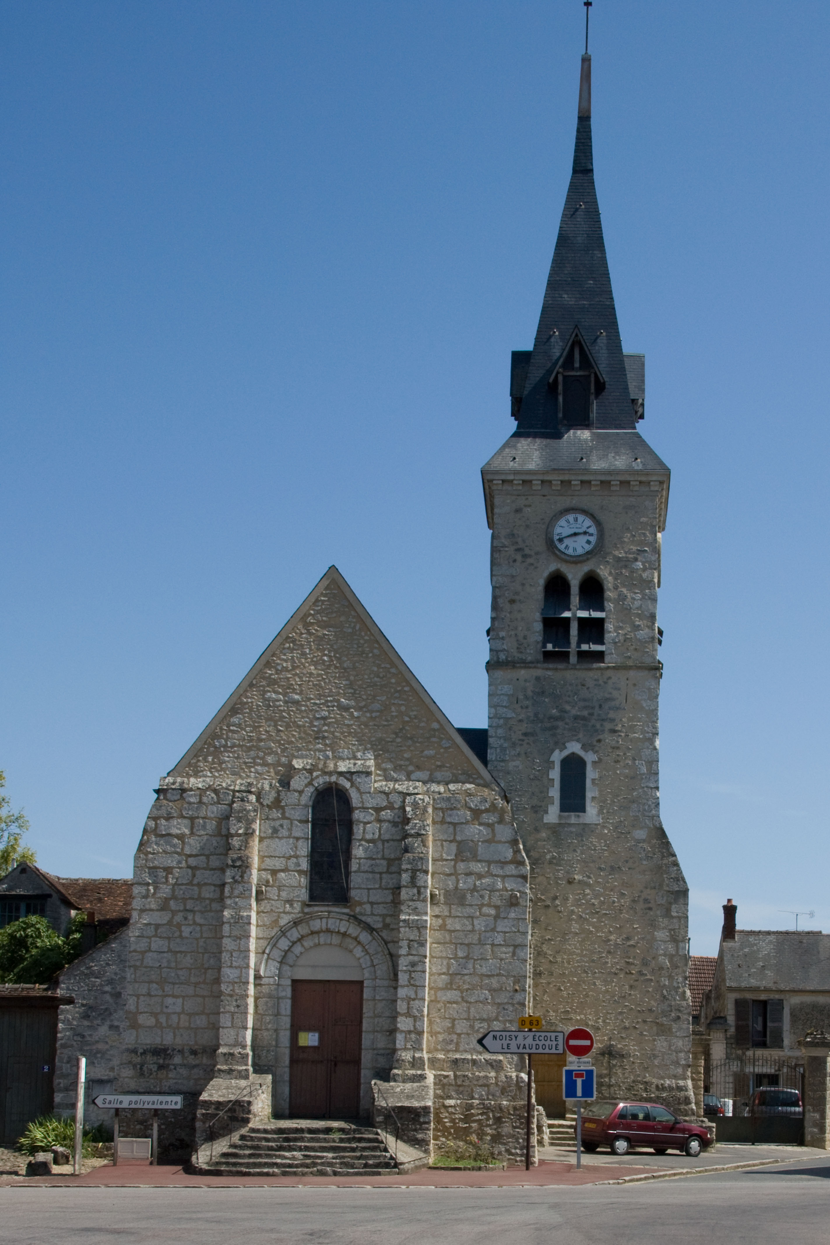 Eglise de Tousson, Tousson, Seine-et-Marne, France